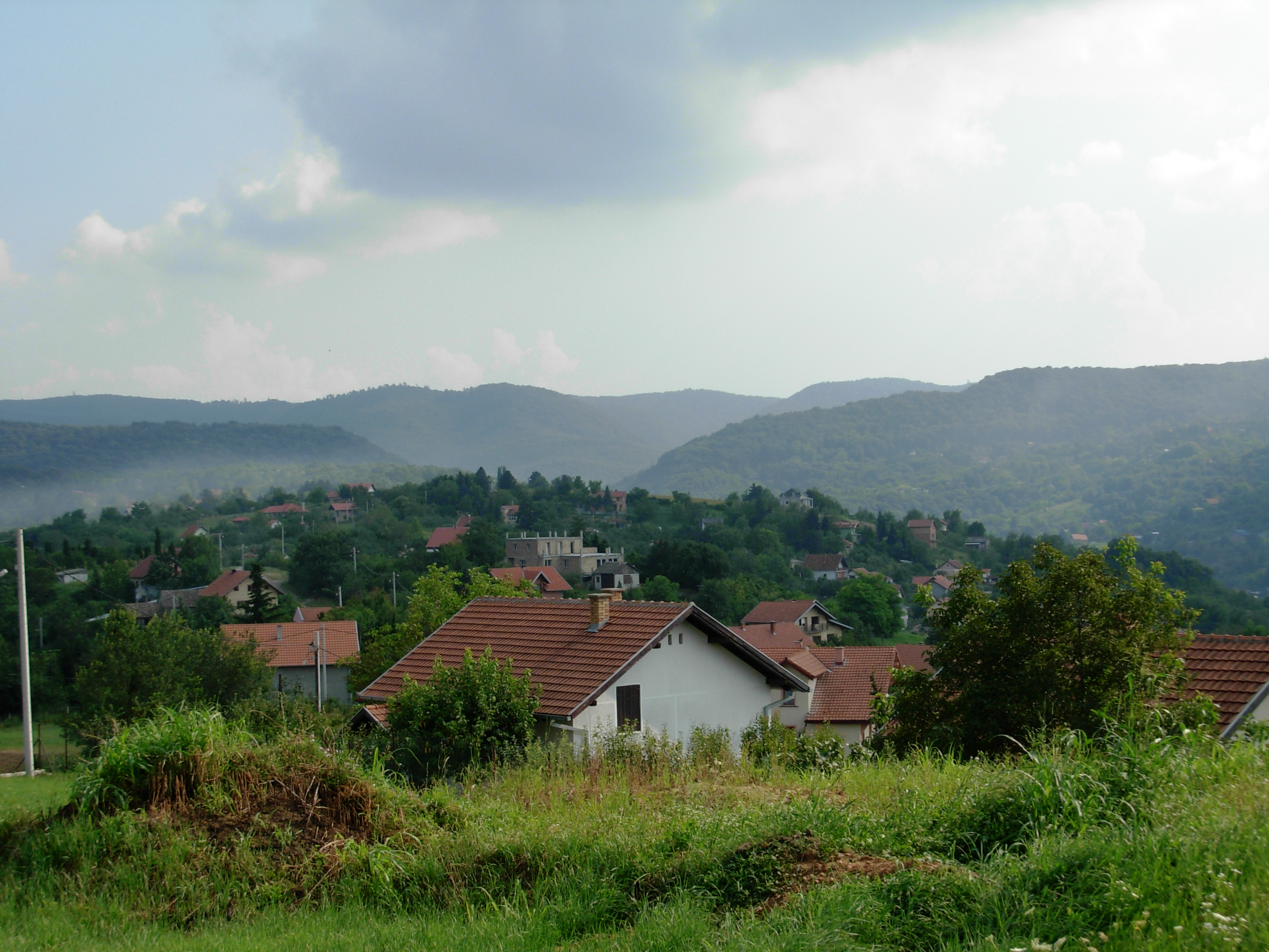 Glavica, iznad Sremske Kamenice.